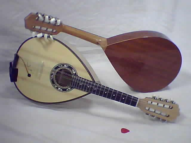 Mandoline